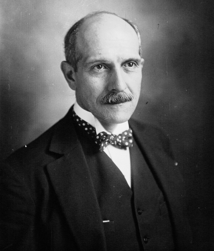 Pietri, député (Corse) : photographie de presse.